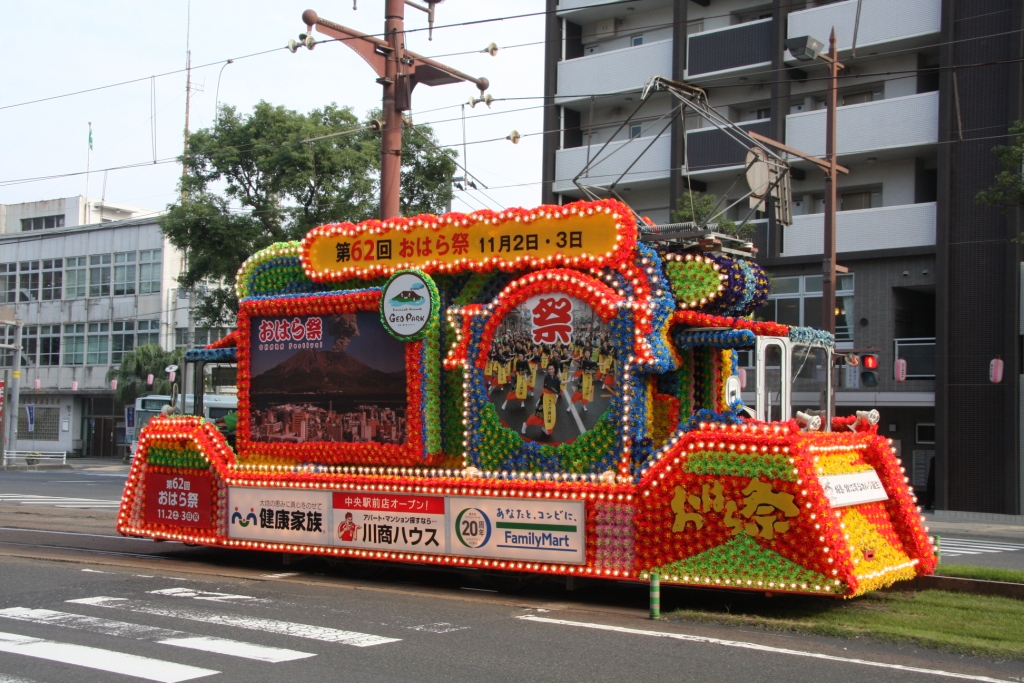 鹿児島市電 2013年の花電車